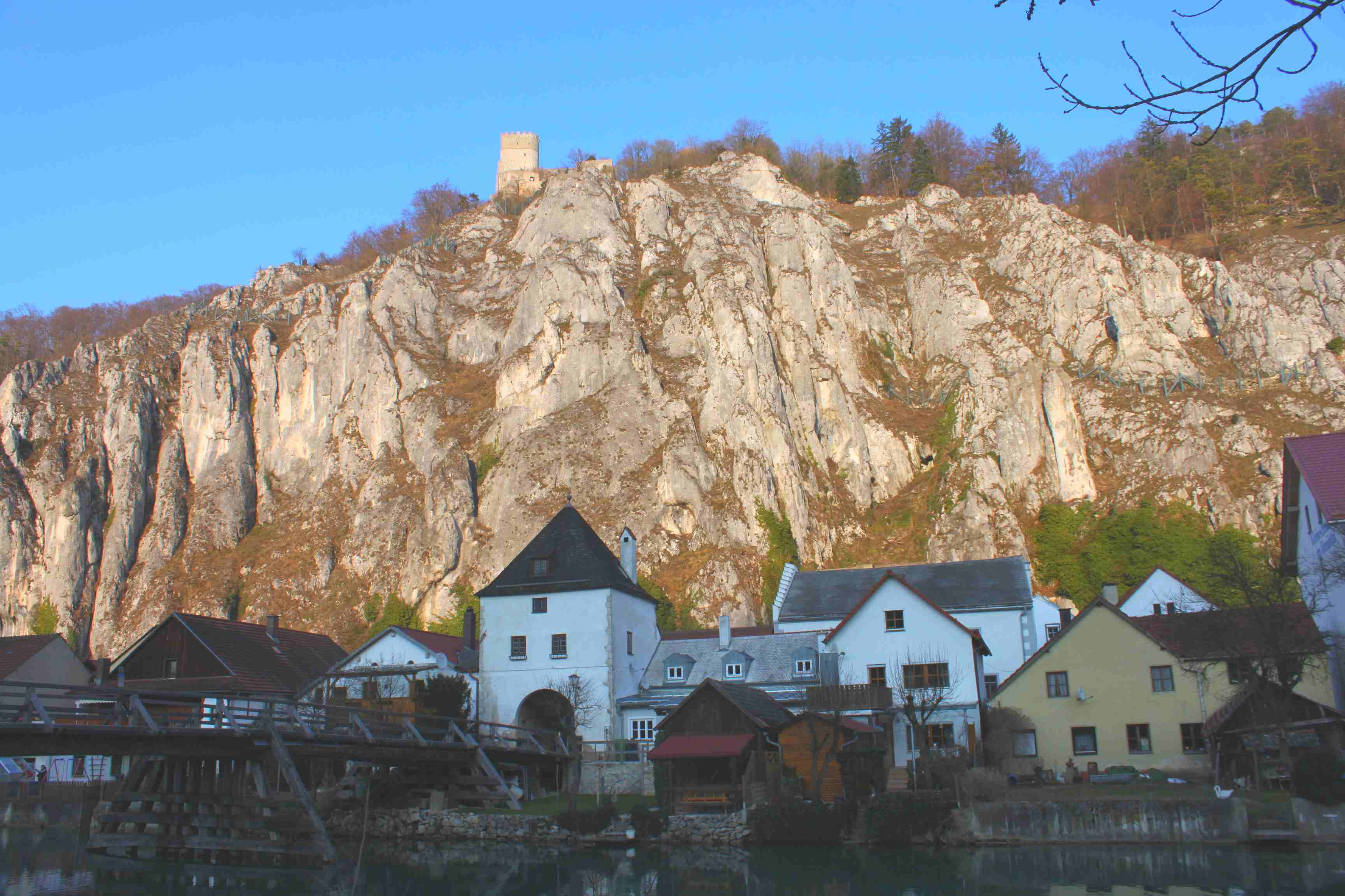 Ortsansicht von Essing mit historischer Brücke